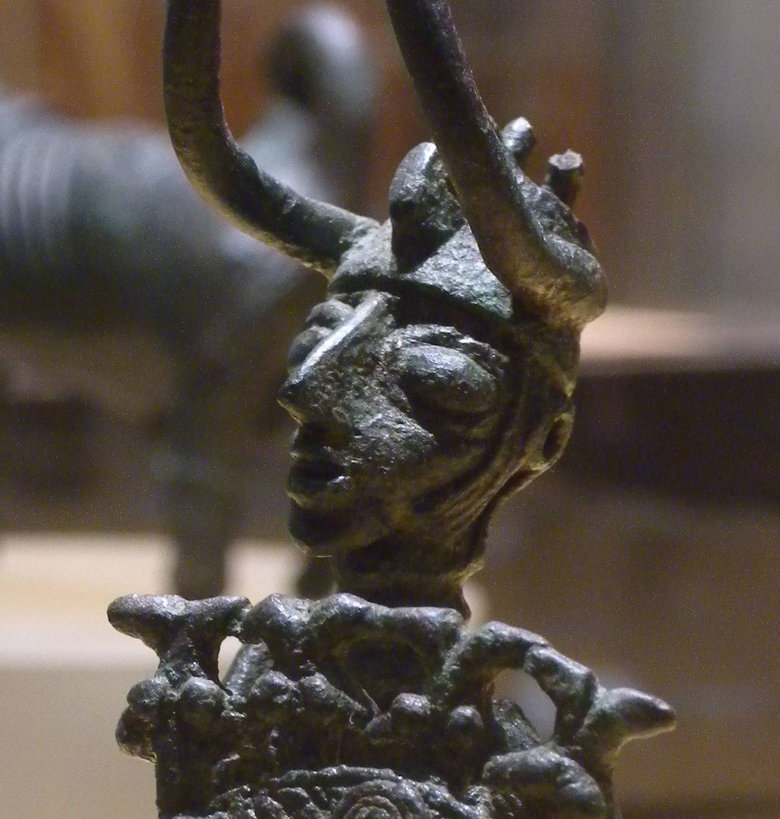 Soldato con Scudo e stocco da Padria (Museo Archeologico Nazionale di Cagliari)